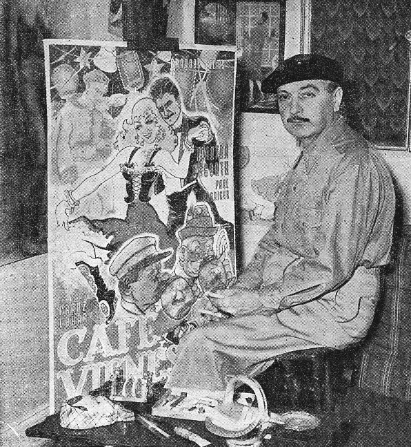 Quirino Cristiani, pionero mundial del cine de animación.